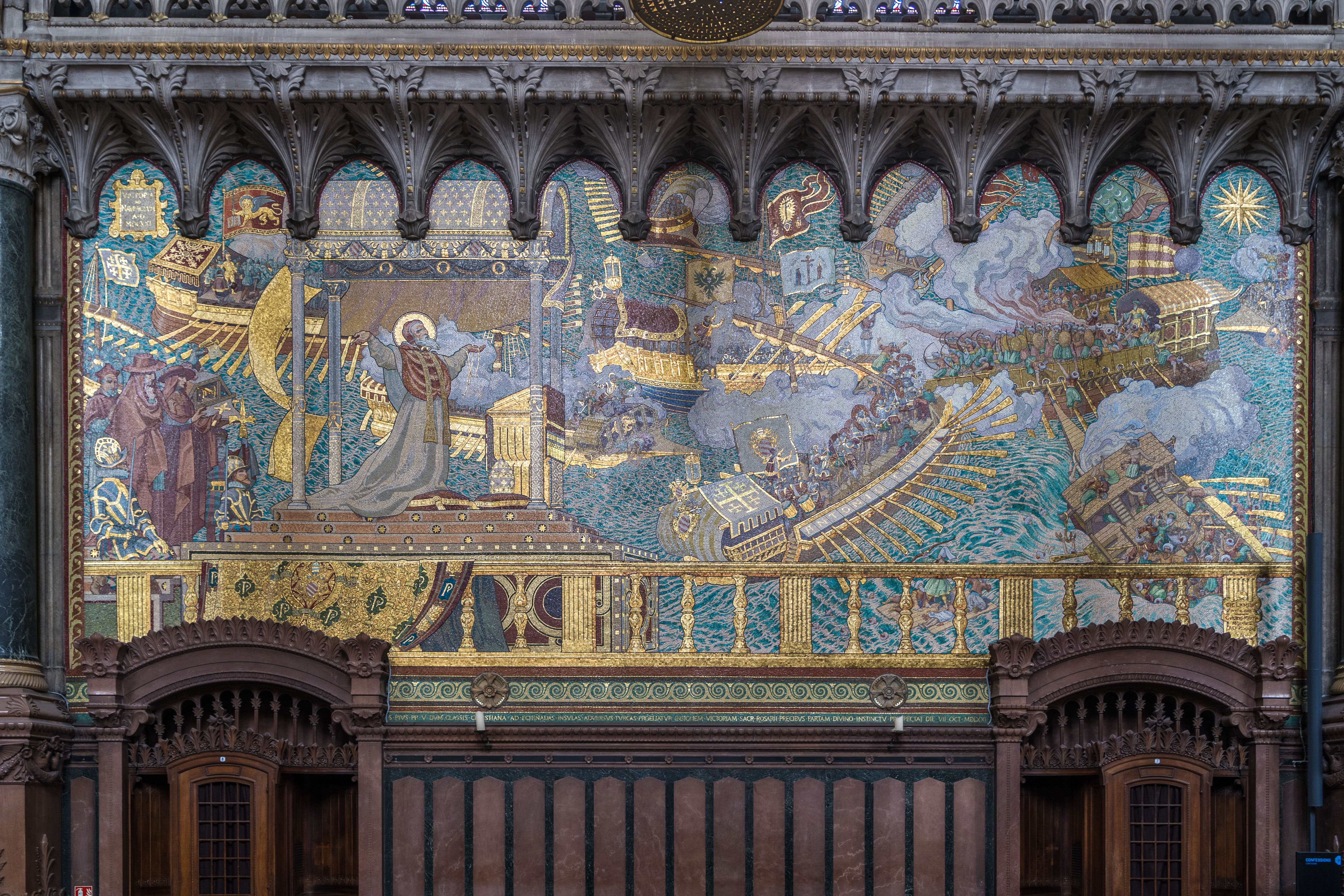 Lyon - Basilique de Fourvière - La bataille de Lépante